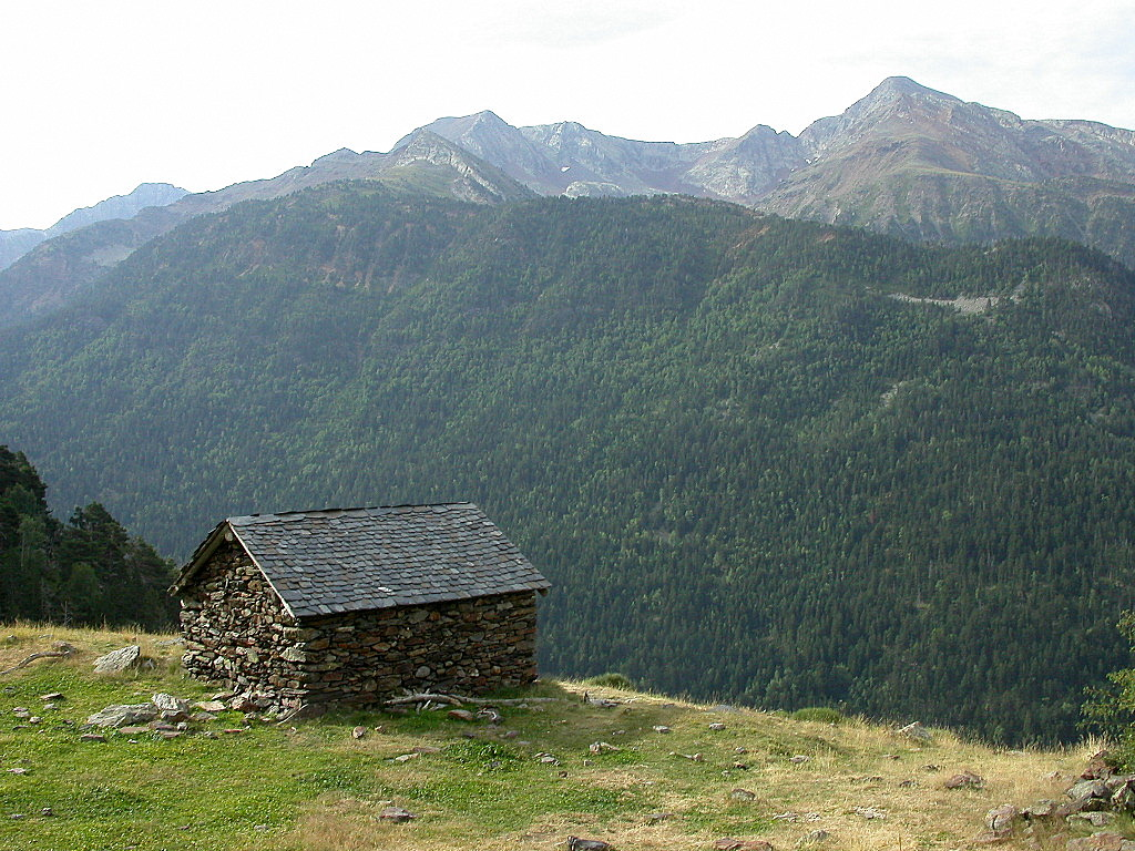 Cabana de Baselló